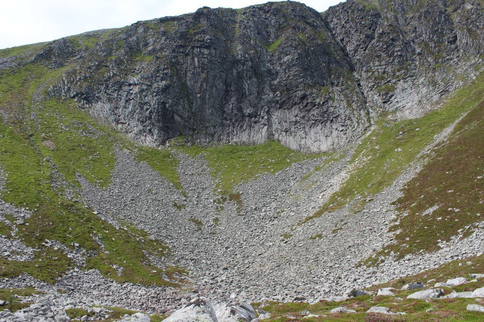 Trollhola på Gamlemsveten 512 - 480 m.o.h